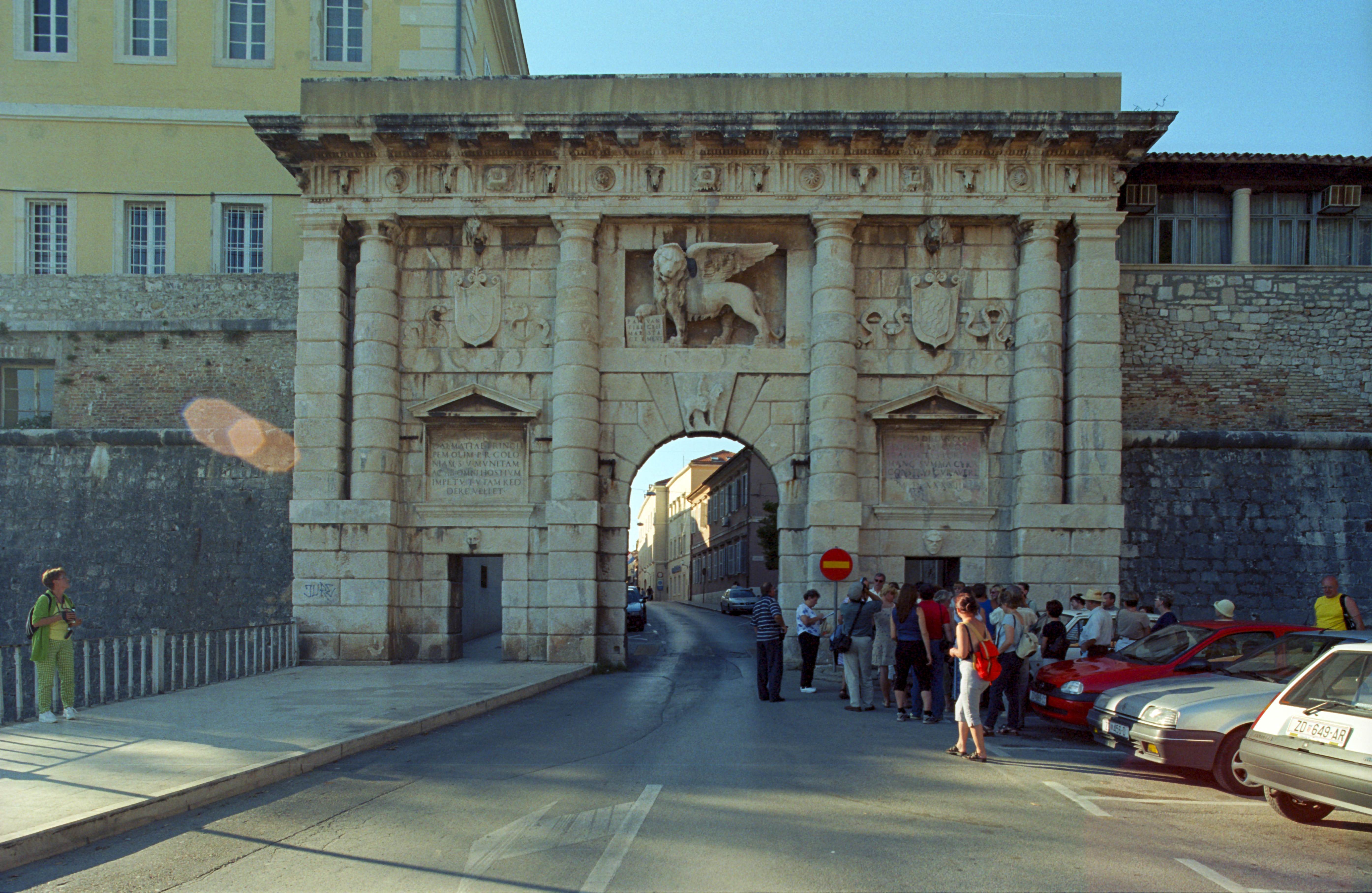 Brama Kopnena Vrata/Porta terraferma (Zadar)